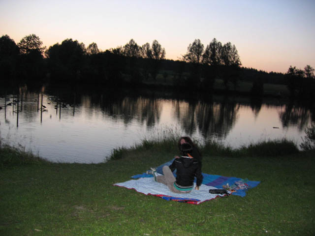 Aichstruter Stausee